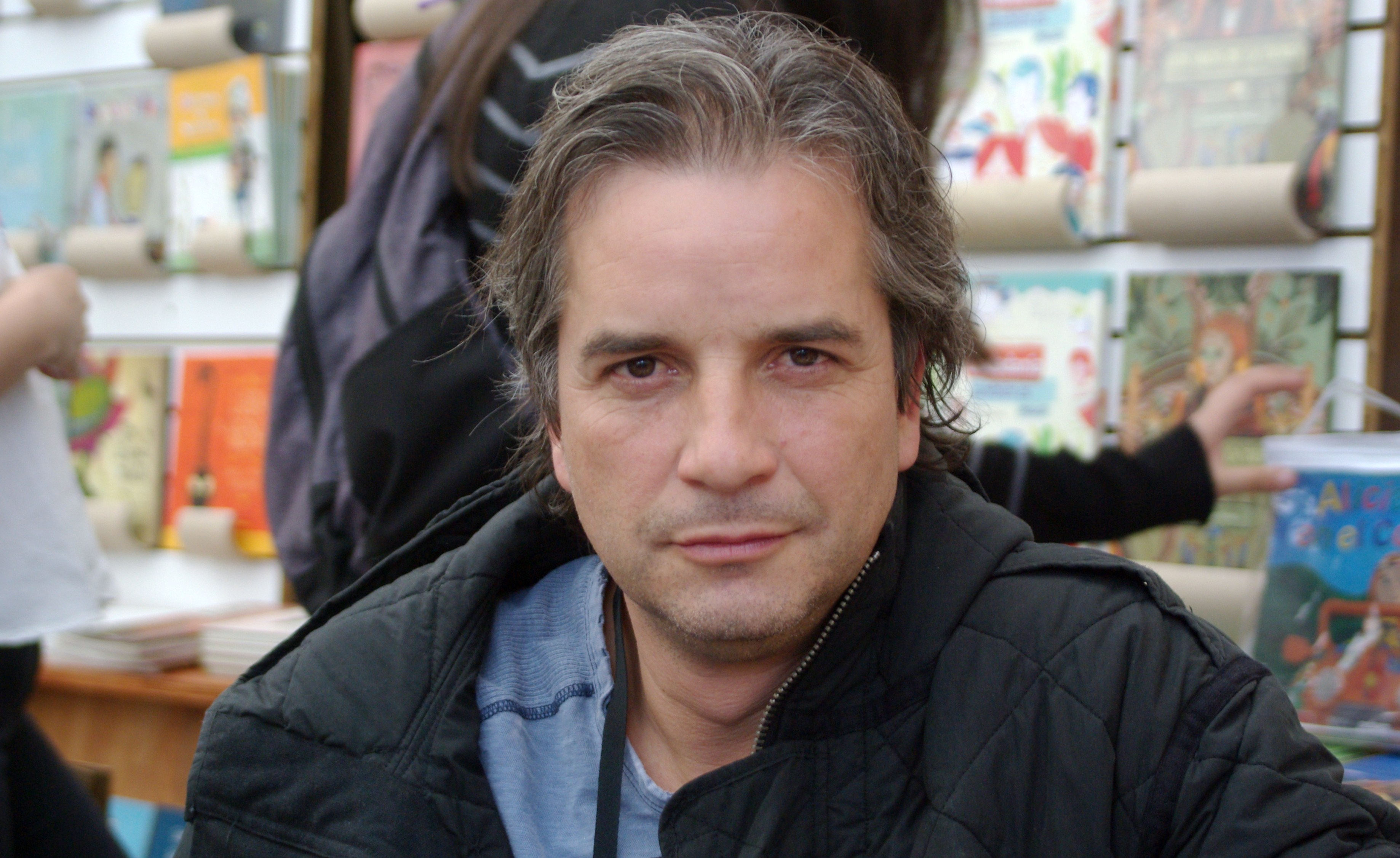 El escritor chileno Pablo Mackenna en la Feria Internacional del Libro de Santiago 2015